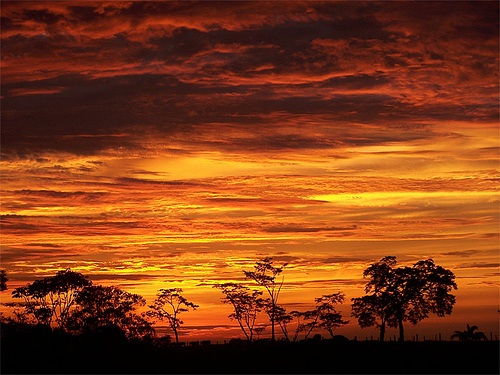 Paisajes de Fortul